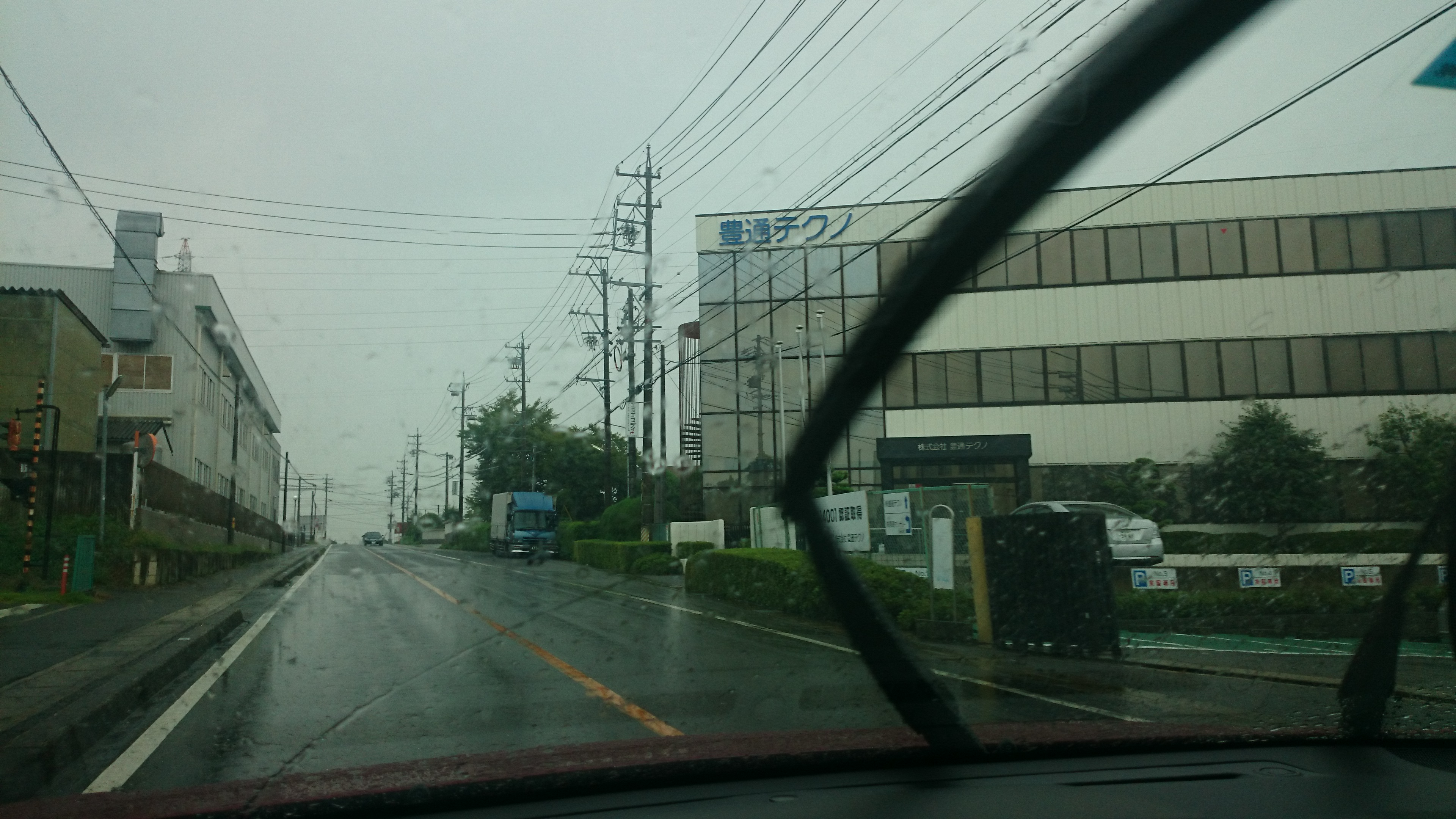 豊通テクノ本社